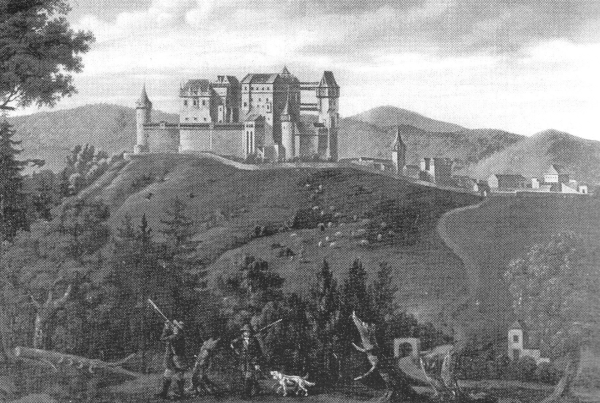 Pernštejn